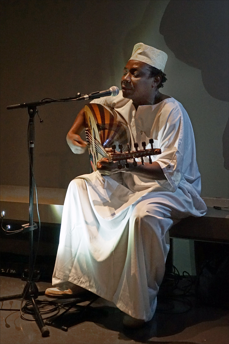 Musique de Zanzibar par M. I. Matona à l'Institut du Monde Arabe Mohamed Issa Matona, directeur artistique au DCMA (Dhow Country Music Academy), jouant du Oud lors de l'inauguration de la nouvelle exposition "Aventuriers des mers", de Sindbad à Marco Polo, de l'Institut du Monde Arabe à Paris. Pages Facebook de l'artiste M. I. Matona Site du DCMA à Zanzibar